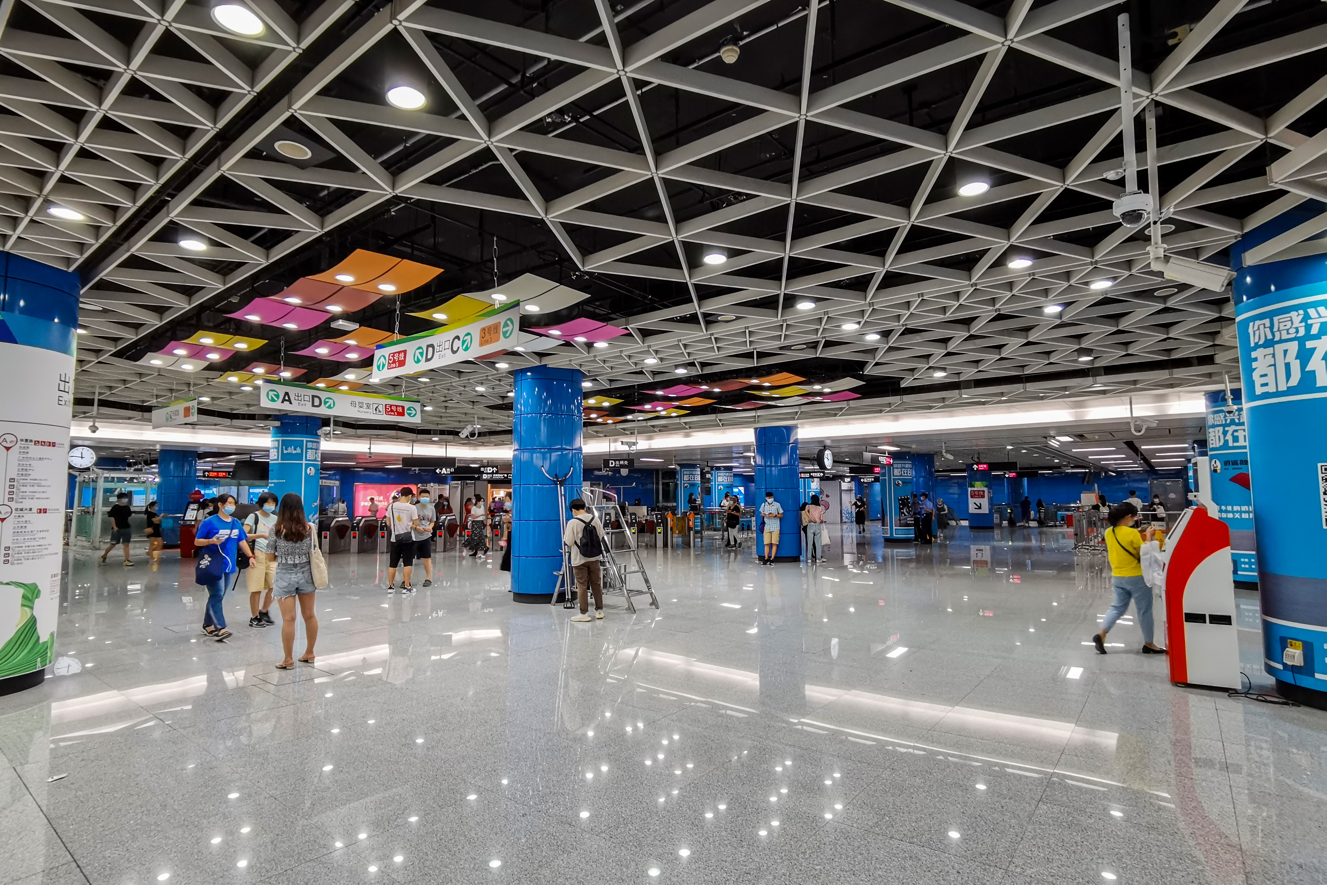 广州地铁珠江新城站